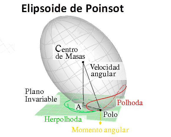 Poinsot’sche Konstruktion